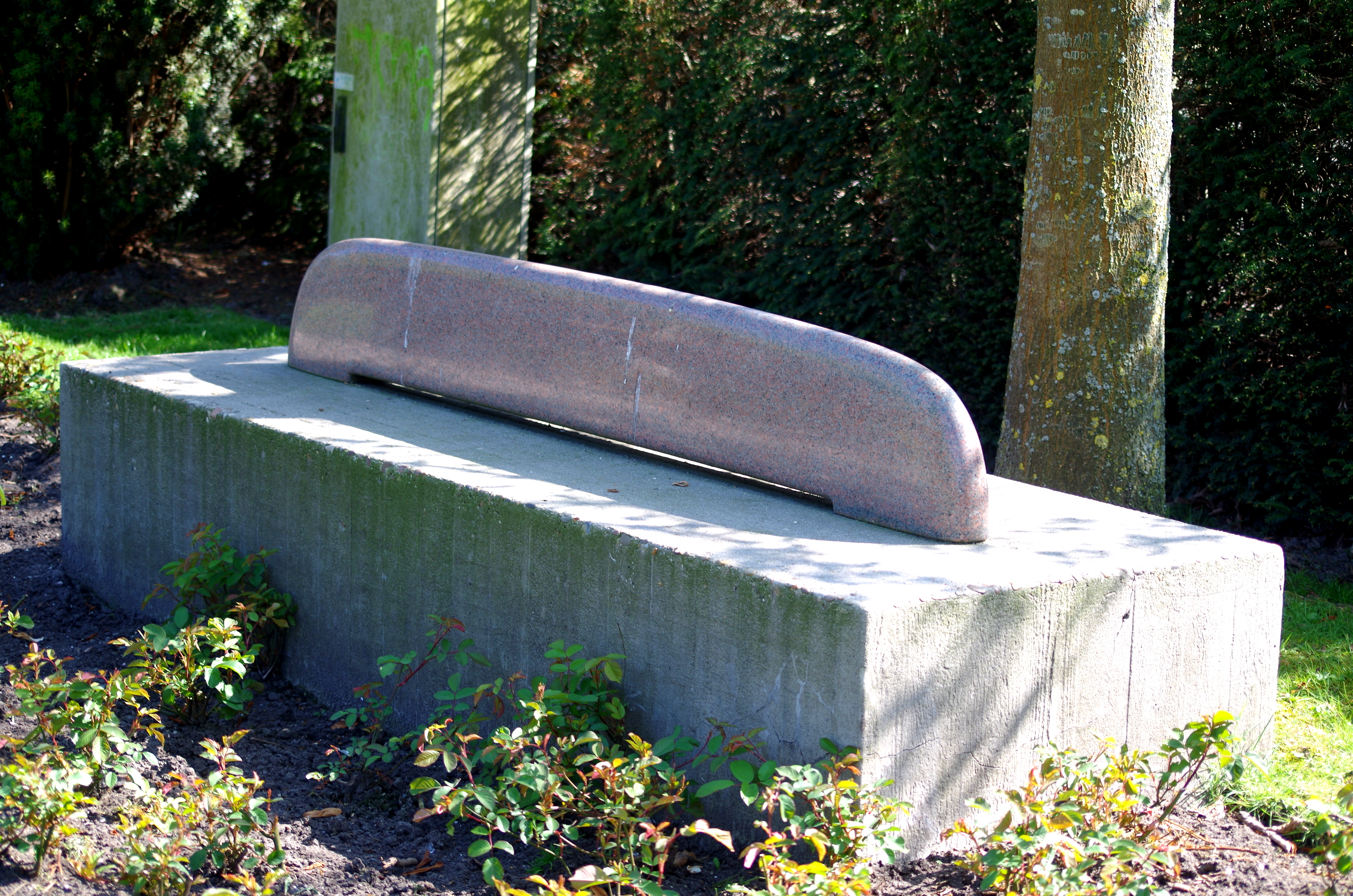 Kunstwerk in het Prins Bernhard Plantsoen in Hengelo